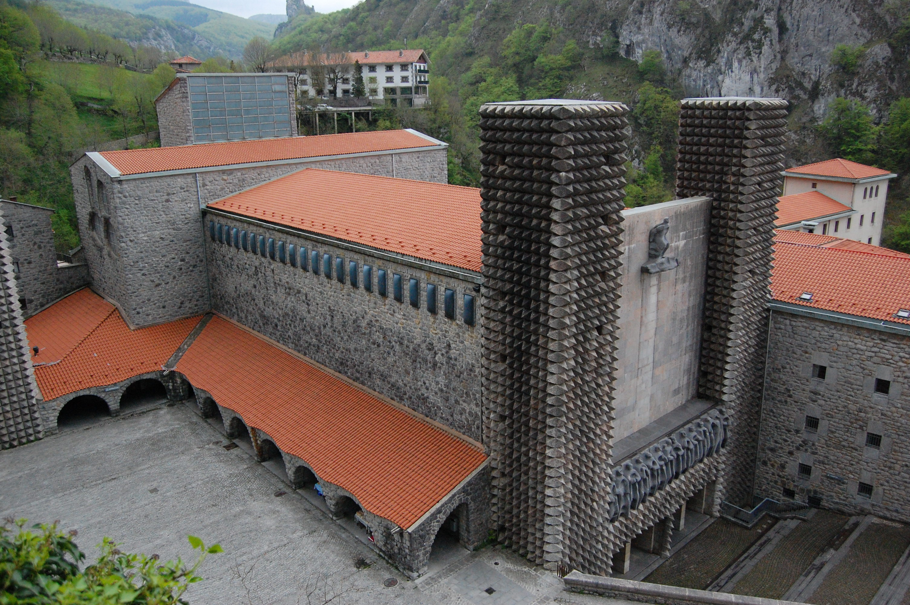 Arantzazu, Oñati, Gipuzkoa, Basque Country